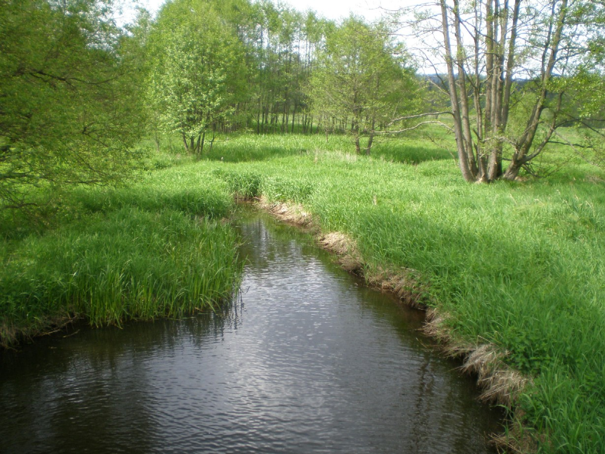 Padrťský potok, po soutoku s Holoubkovským potokem zvaný Klabava, nedaleko pod Padrťskými rybníky.